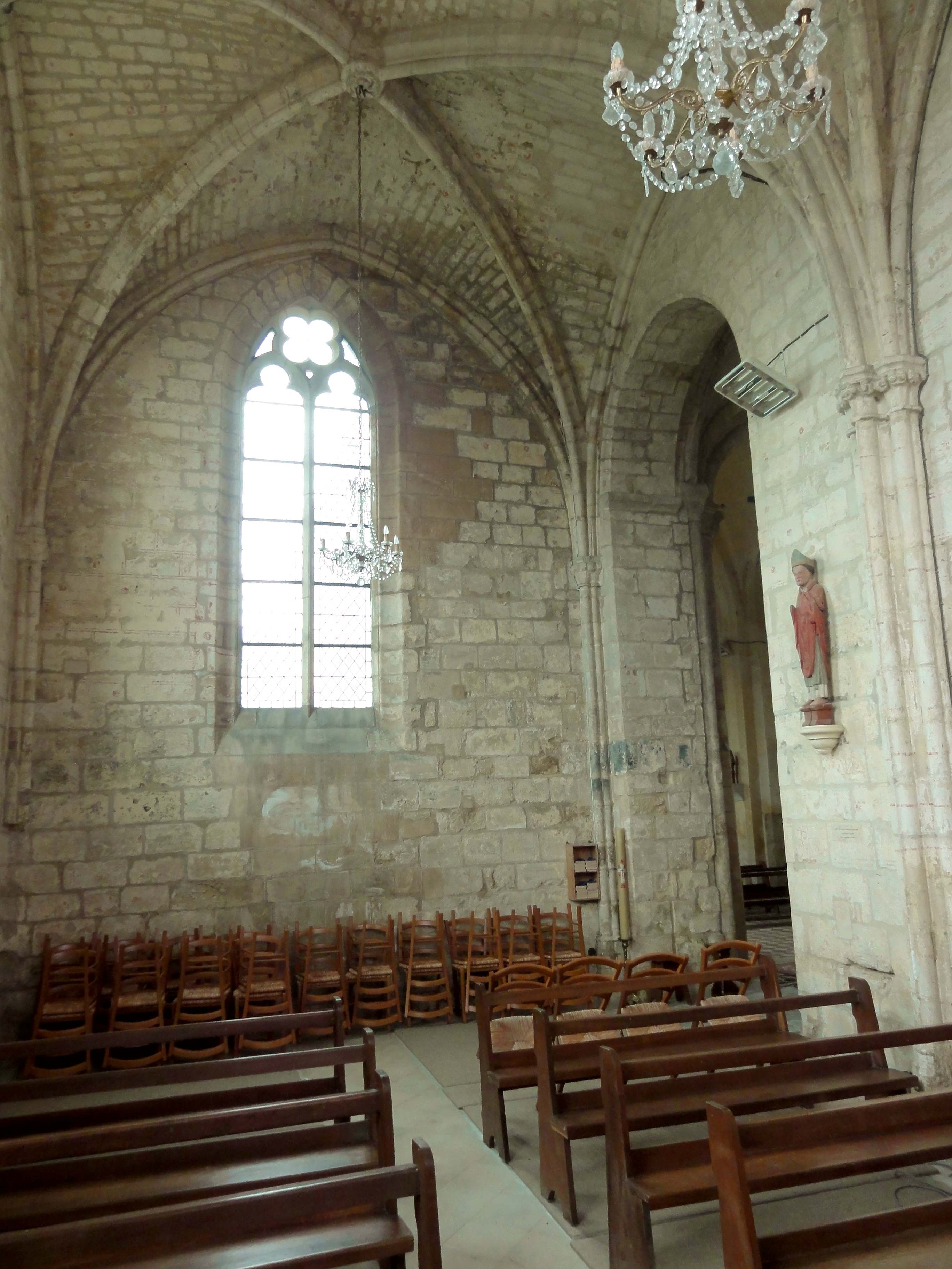 Intérieur de l'église (voir titre).